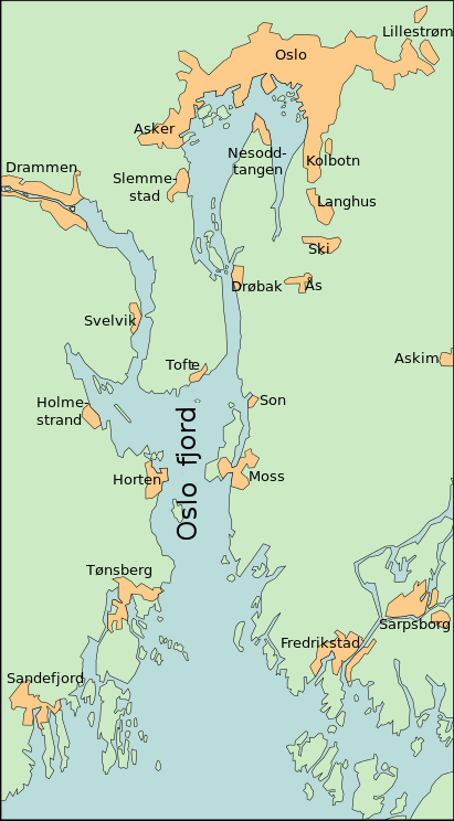 Oslo fjord